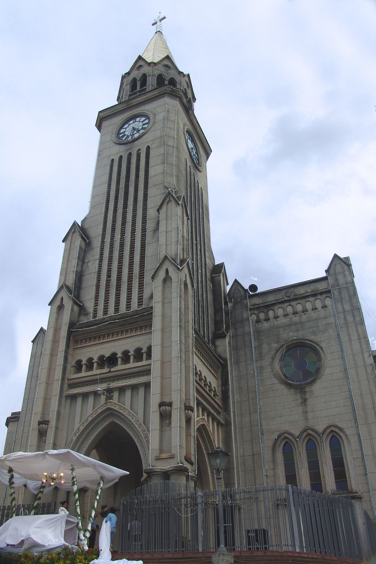 Igreja matriz em Piraju, São Paulo, Brasil